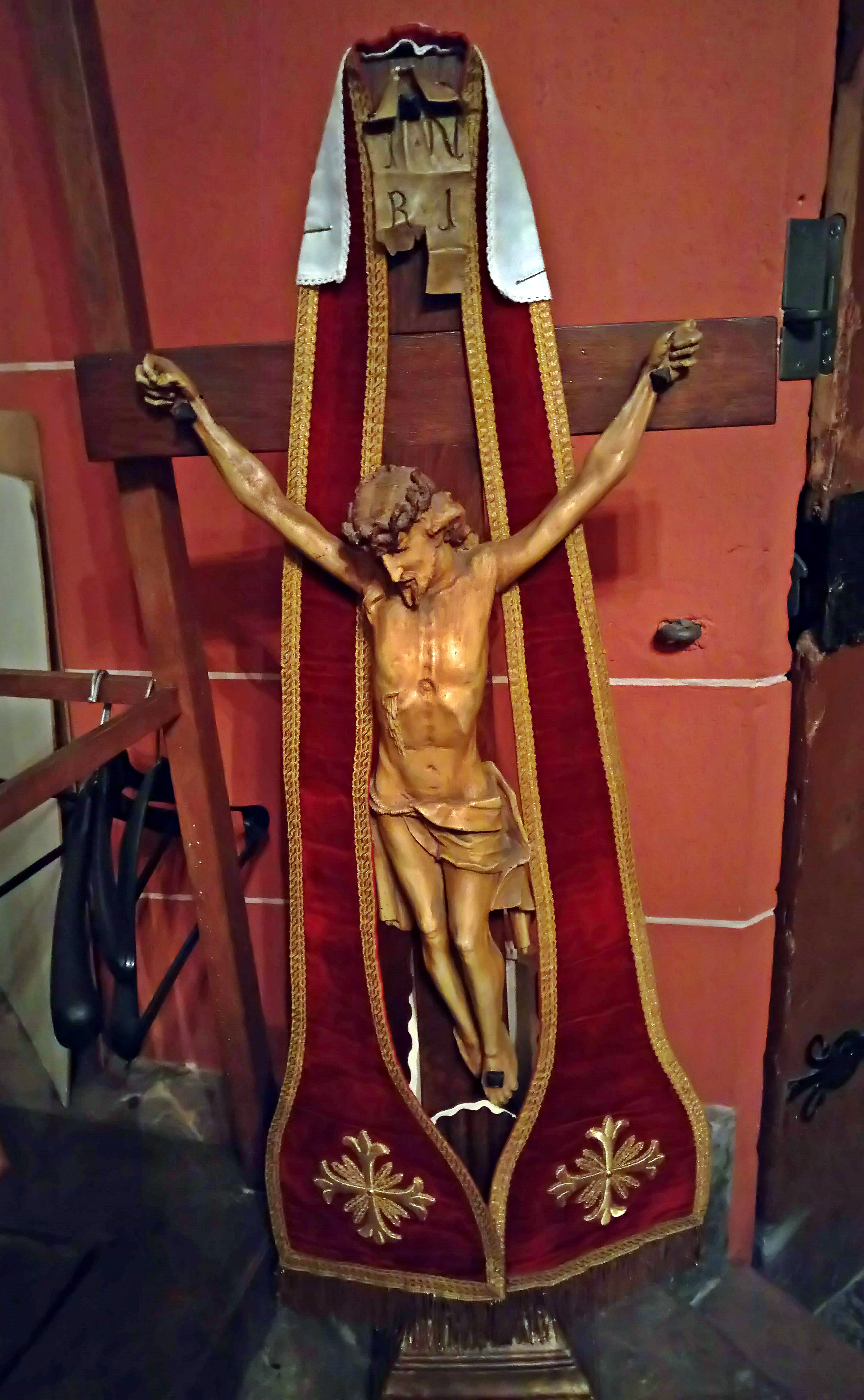 Palmsonntagskreuz Neustadt an der Weinstraße